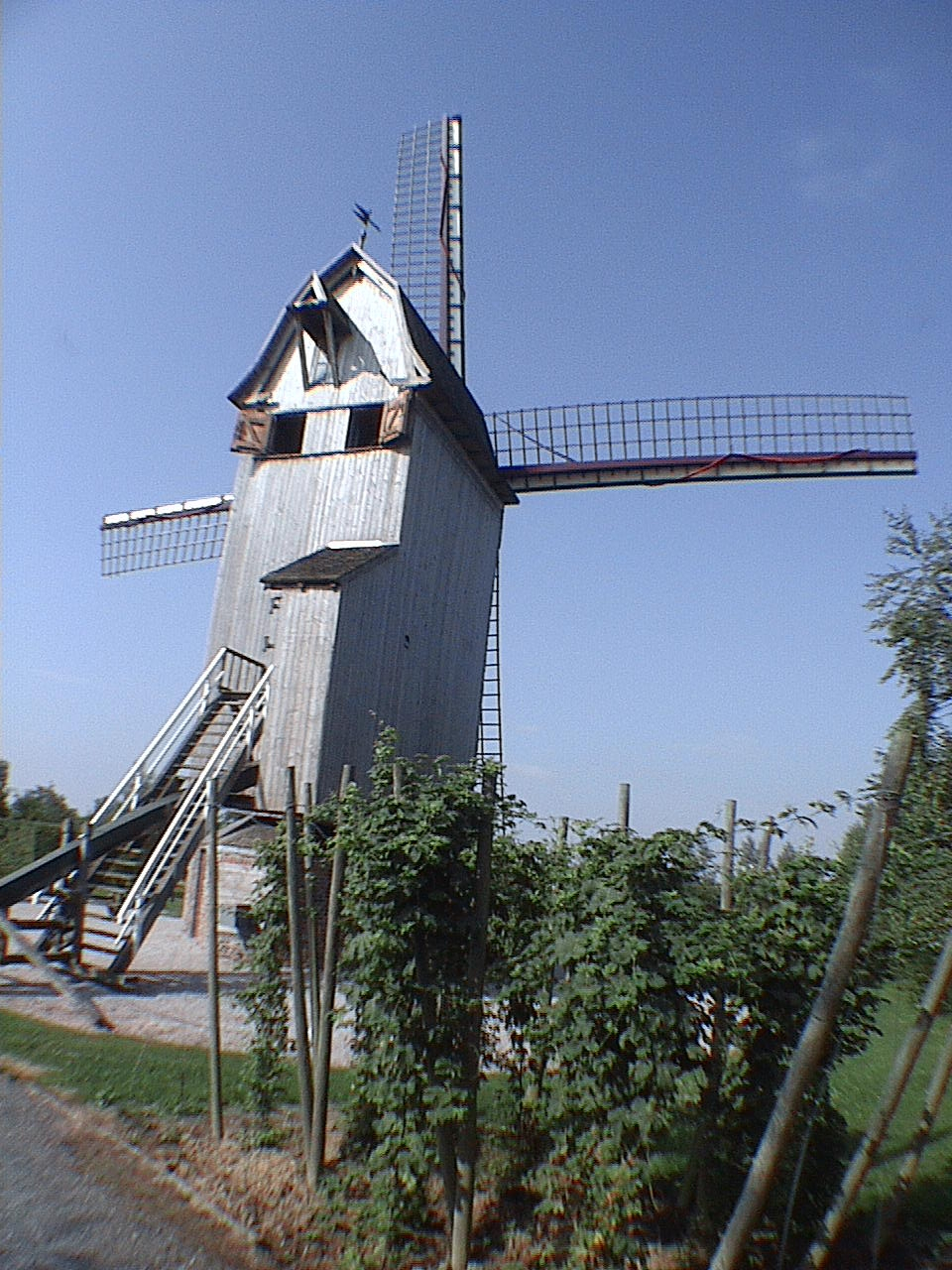 Le Drievenmeulen